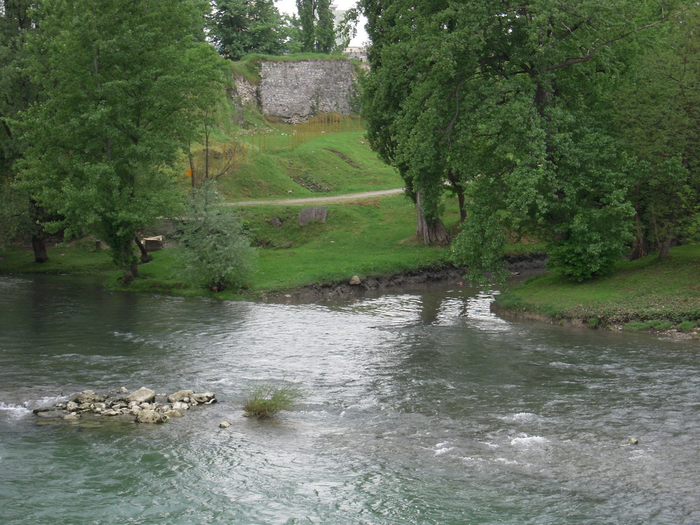 Ušće_Crkvene_u_Vrbas